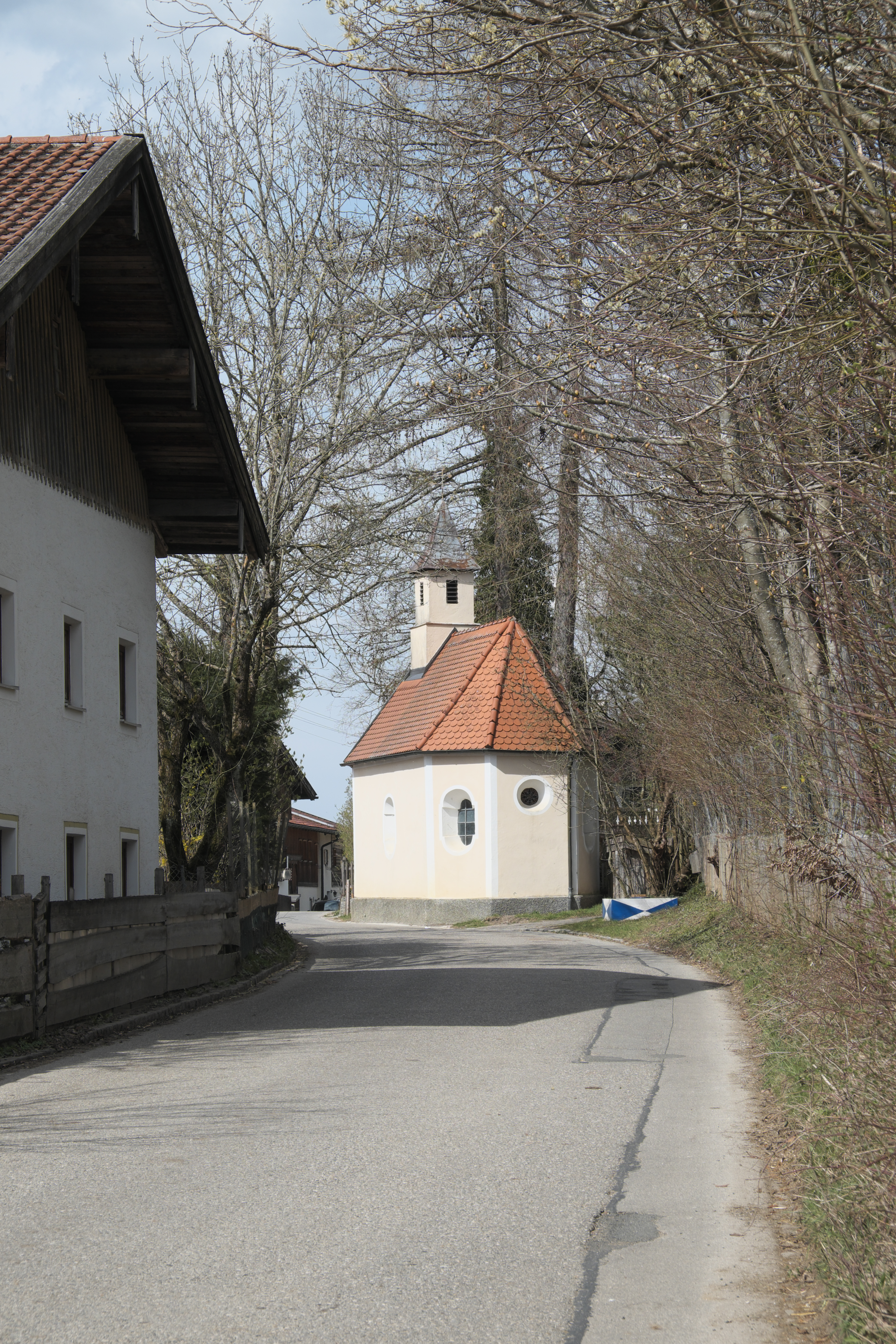 Katholische Kapelle St. Stephanus in Attenhausen (Icking) im Landkreis Bad Tölz-Wolfratshausen (Bayern/Deutschland), aus der zweiten Hälfte des 17. Jahrhunderts